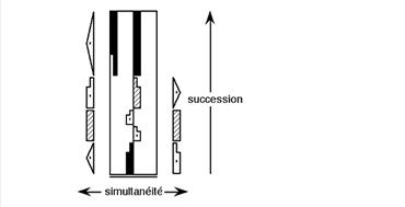 Labanotation signs set 3